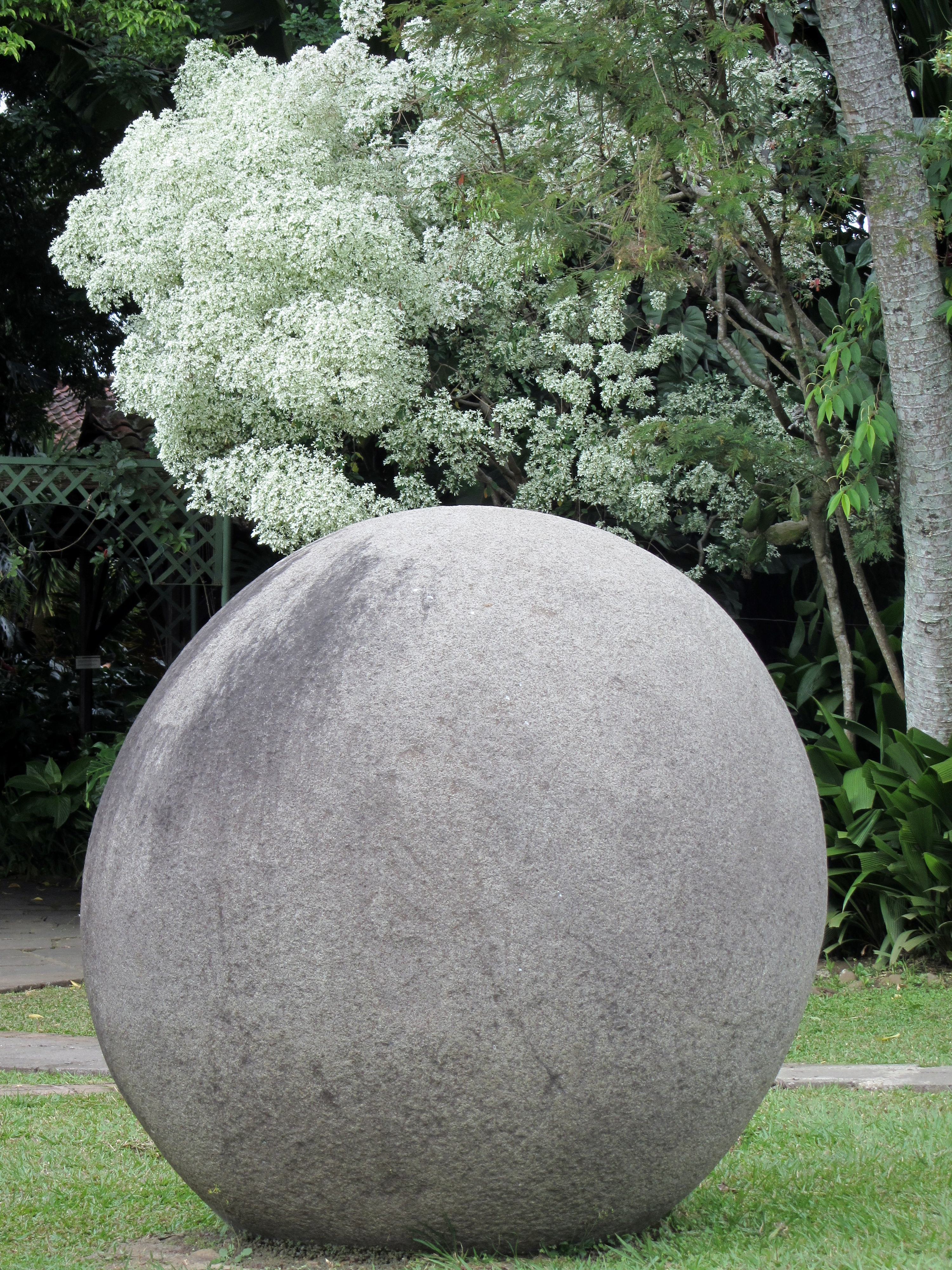 Museo Nacional de Costa Rica